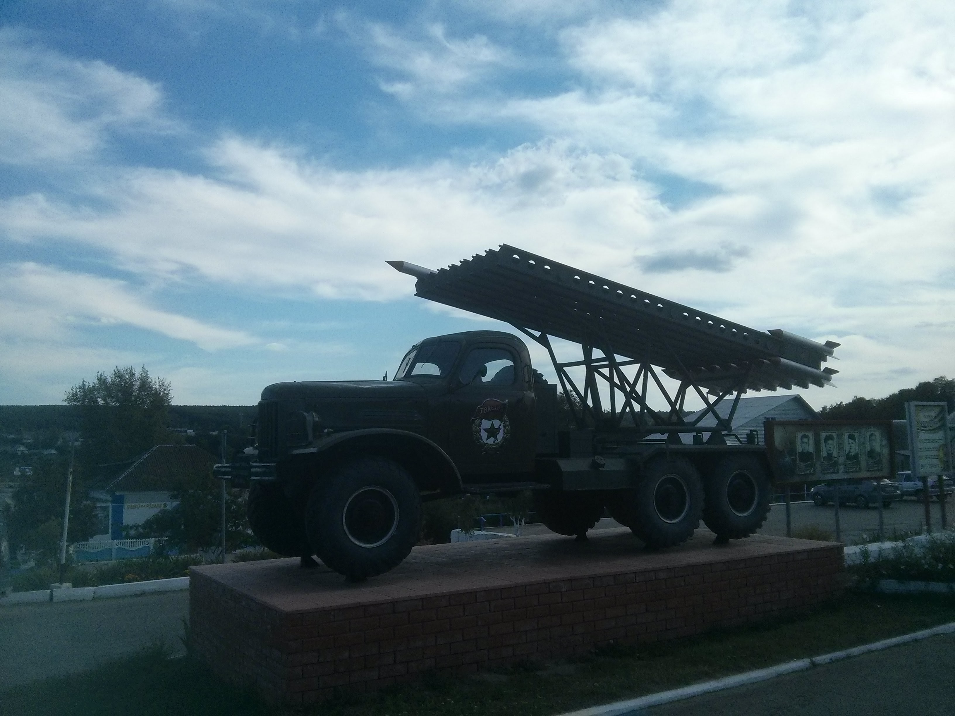 БМ-13 в Николаевке